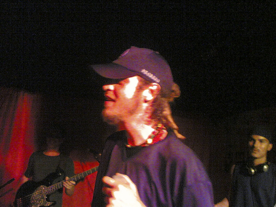 no StudioSP